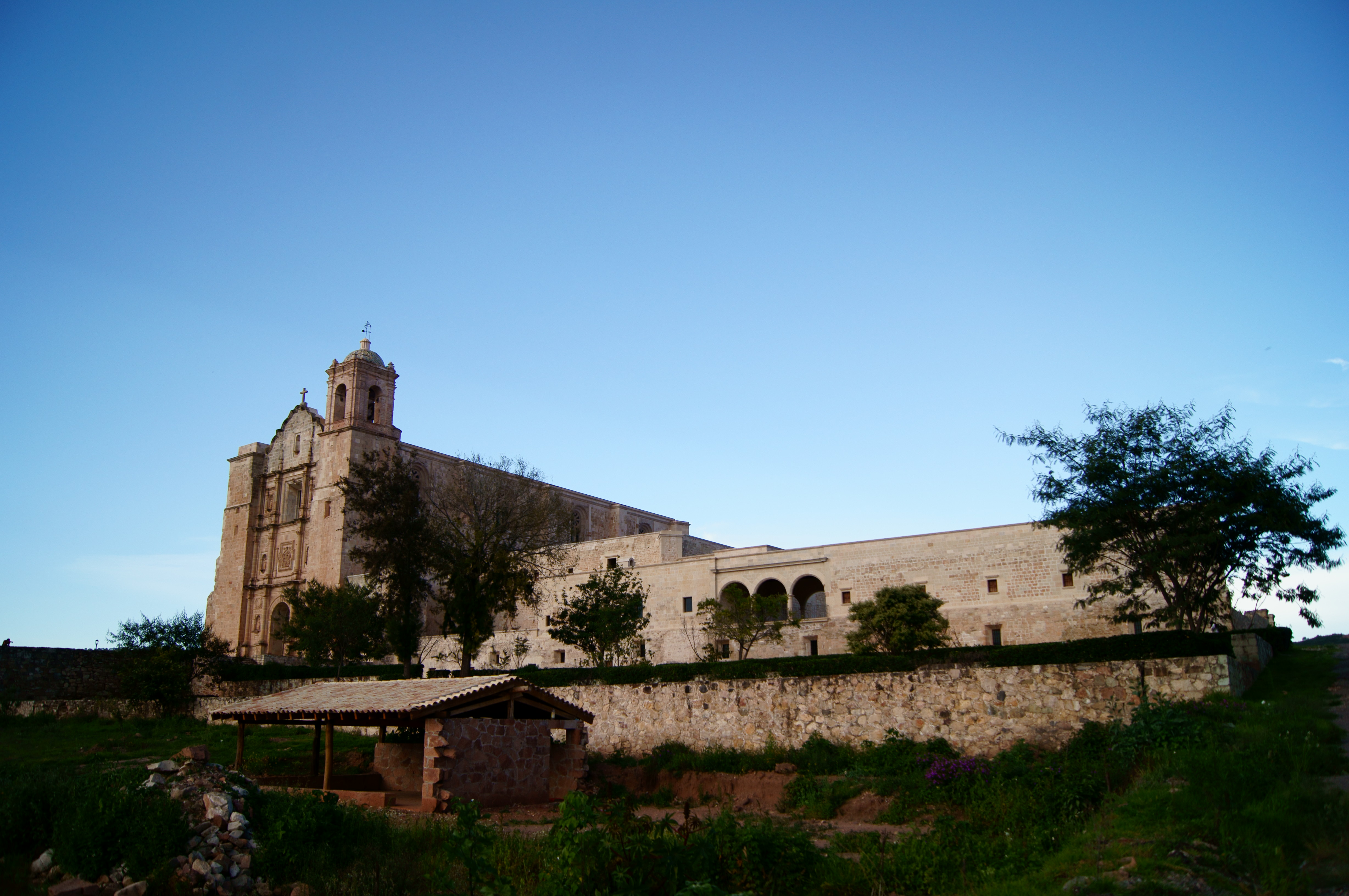 otro angulo del templo y ex-convento